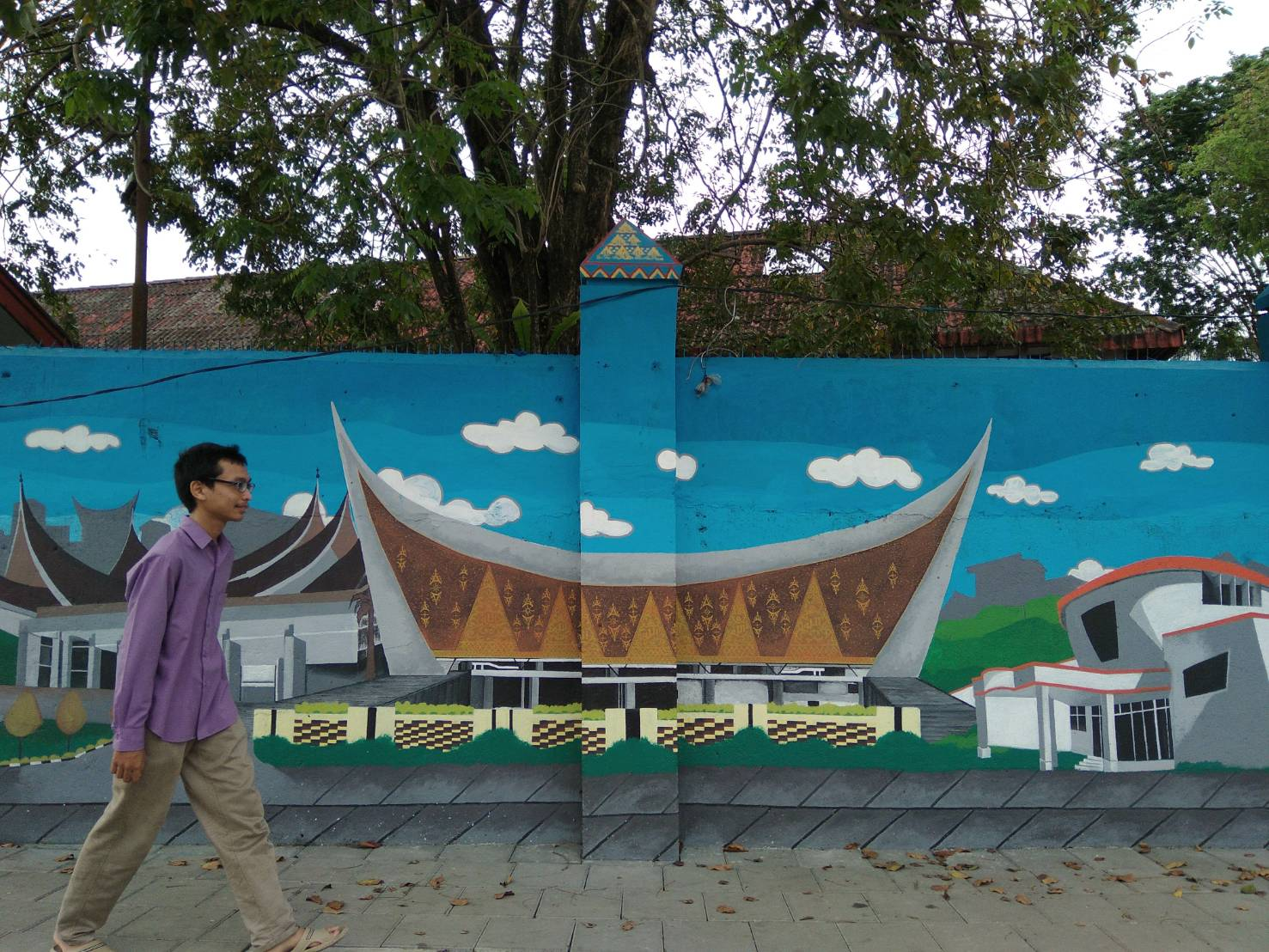 Dengan latar belakang mural, pengunjung berjalan di jalur pedestrian di Pasar Raya, Padang, Sumatera Barat, Jumat. Pemkot Padang mempercantik jalur pedestrian di pasar itu yang awalnya kumuh menjadi indah dengan mural objek wisata.